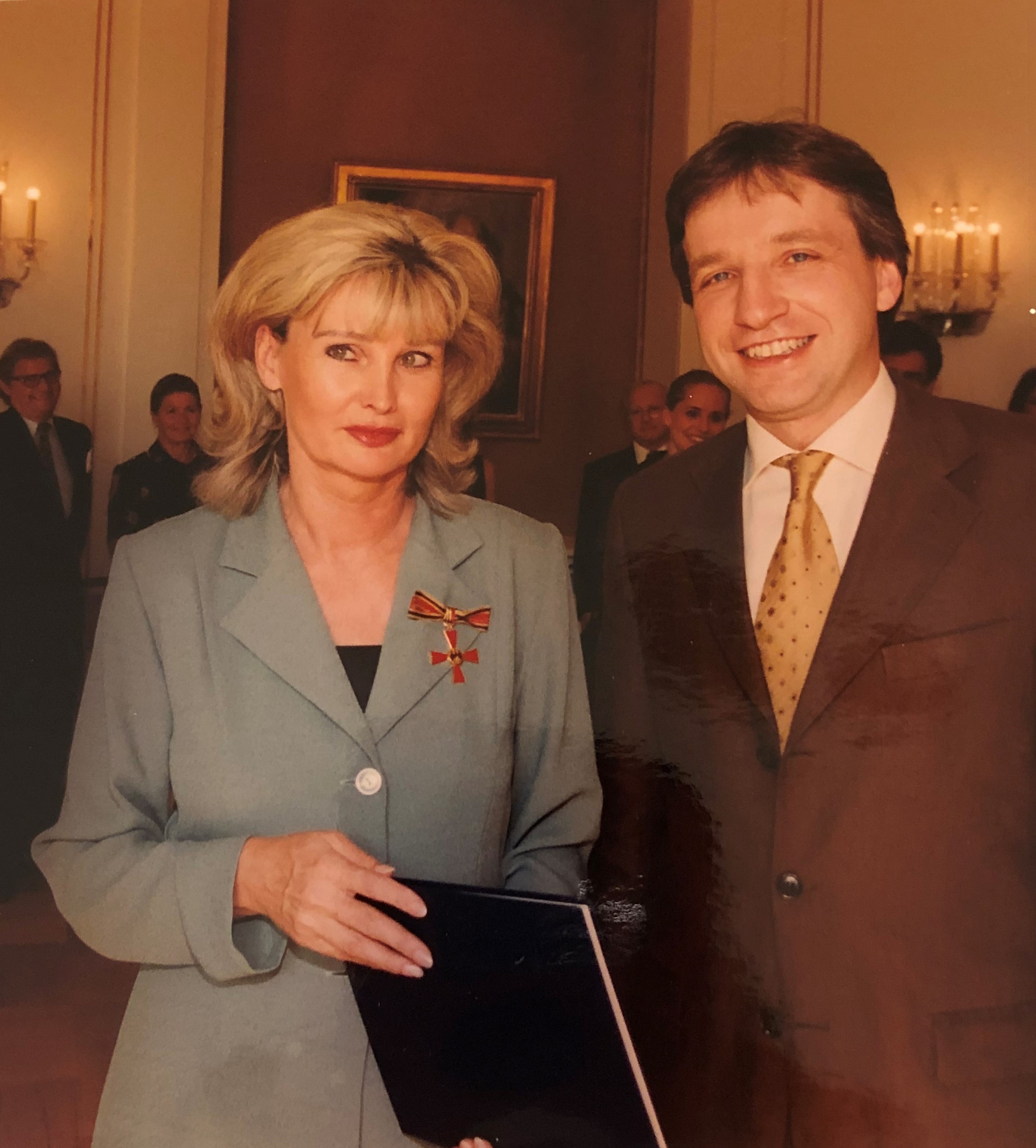 Claudia Porsche, Verleihung des Bundesverdienstkreuzes